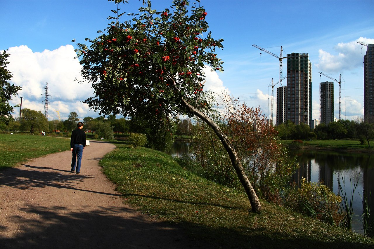 Старое русло реки Волковки в парке Интернационалистов